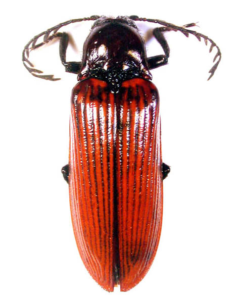 Plectrosternus